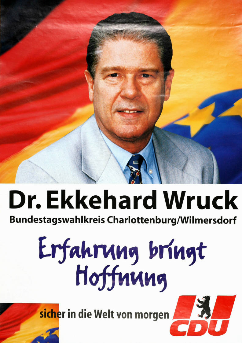 Dr. Ekkehard Wruck Bundestagswahlkreis Charlottenburg/Wilmersdorf Erfahrung bringt Hoffnung sicher in die Welt von morgen CDU Abbildung: Porträtfoto - Nationalfarben Plakatart: Kandidaten/Personenplakat mit Objekt-Signatur: 10-001: 5050 Bestand: Plakate zu Bundestagswahlen (10-001) GliederungBestand10-18: Plakate zu Bundestagswahlen (10-001) » Die 14. Bundestagswahl am 27. September 1998 » CDU » Mit Porträtfoto Lizenz: KAS/ACDP 10-001: 5050 CC-BY-SA 3.0 DE